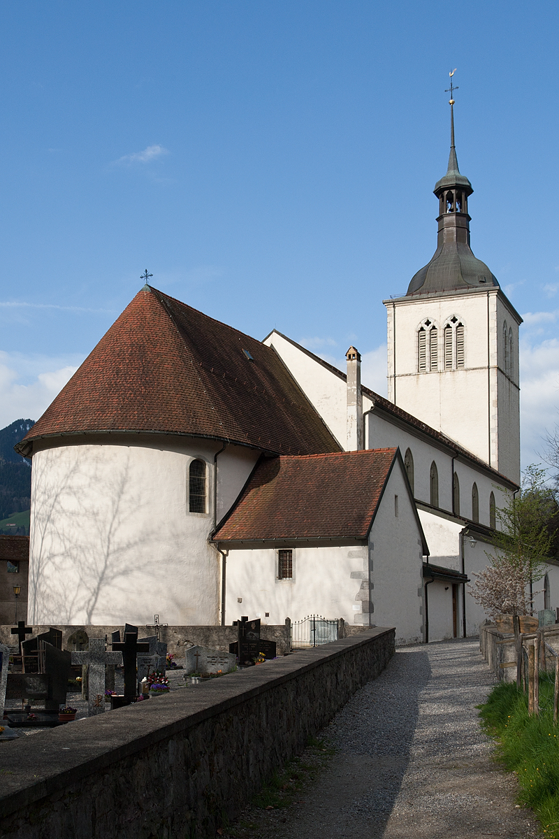 Eglise Saint-Théodule à Gruyères (FR)